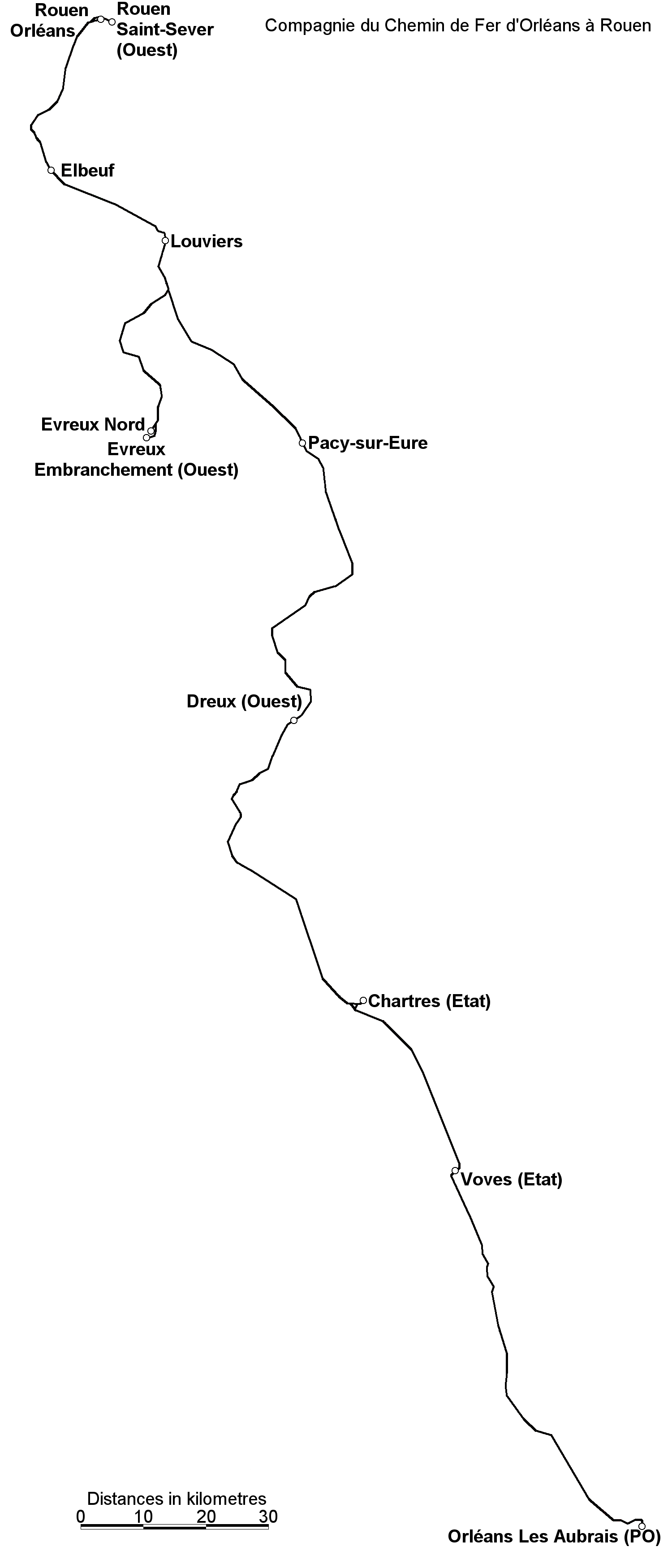 Plan of the Compagnie du Chemin de Fer d'Orléans à Rouen, Normandie.